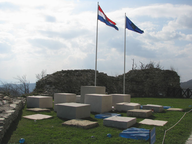 Oltar domovine na Medvedgradu, Zagreb